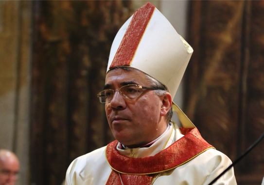 D_Nuno_Bispo